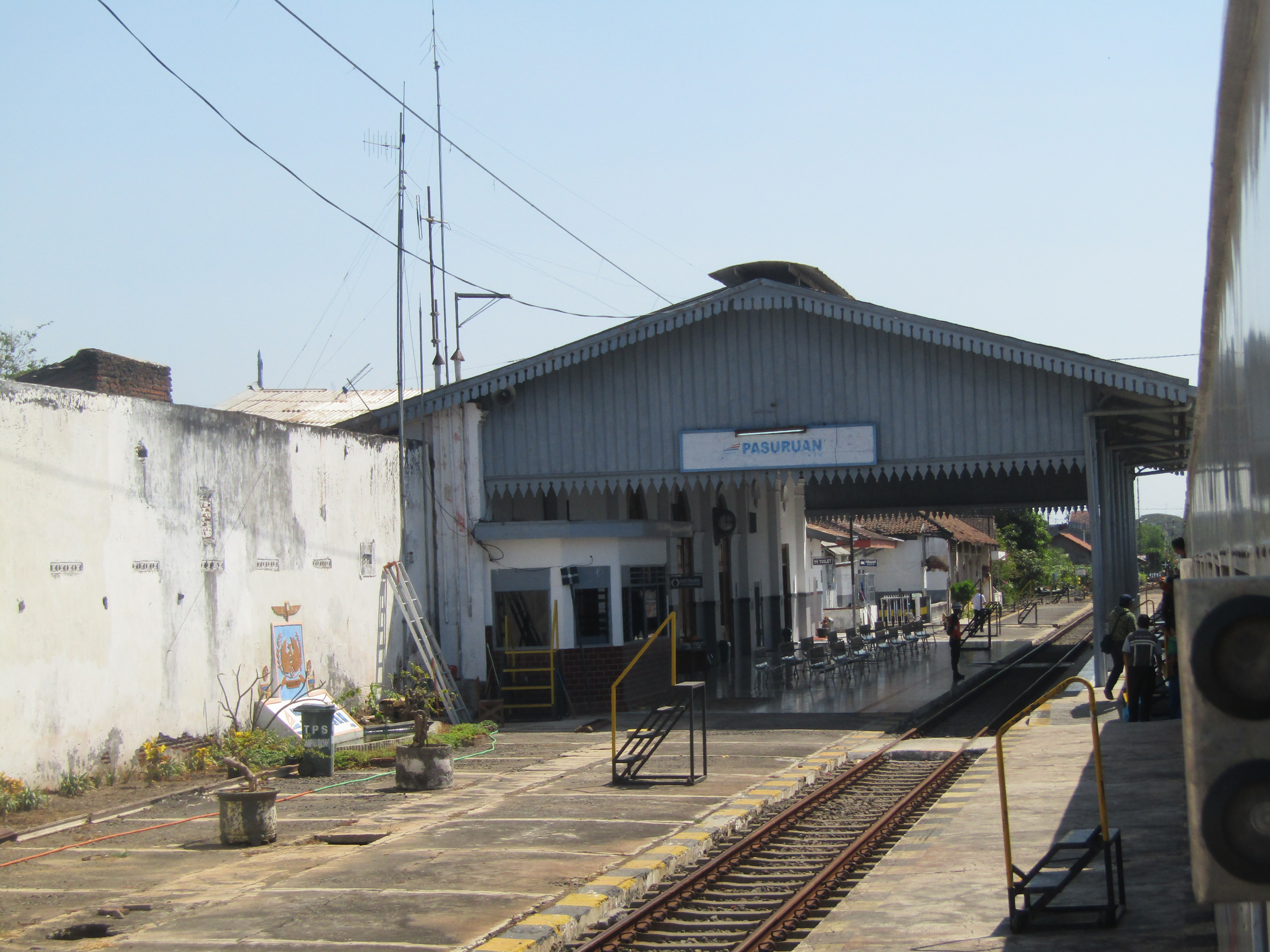 Kanopi emplasemen Stasiun Pasuruan